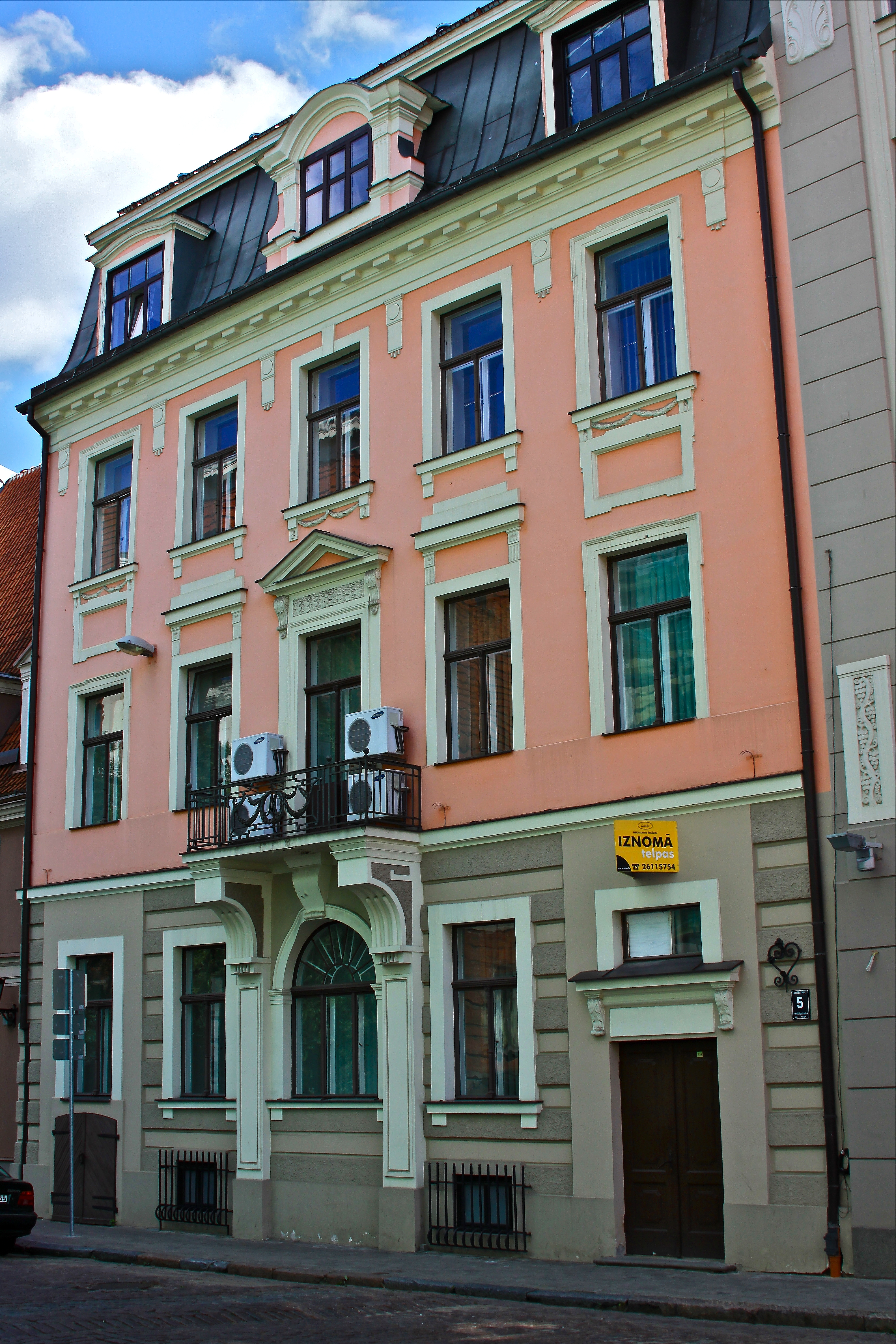 Фото здания на улице Смилшу, 5